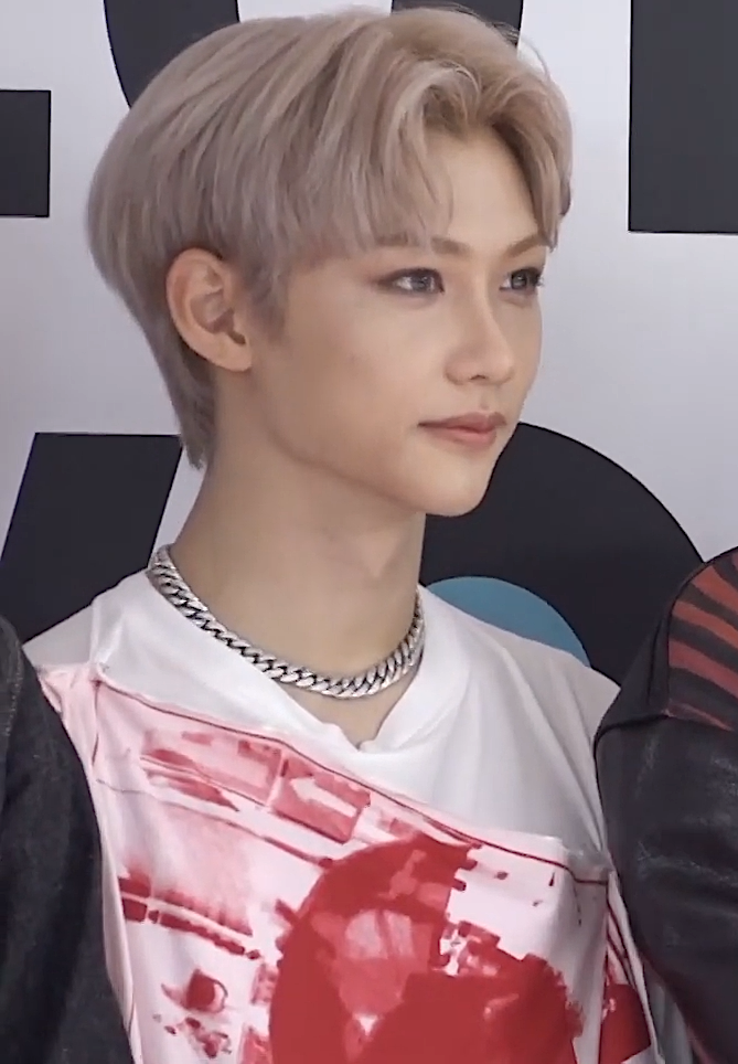 Stray Kids Felix於2019年8月24日在2019 K-WORLD FESTA的媒體拍攝